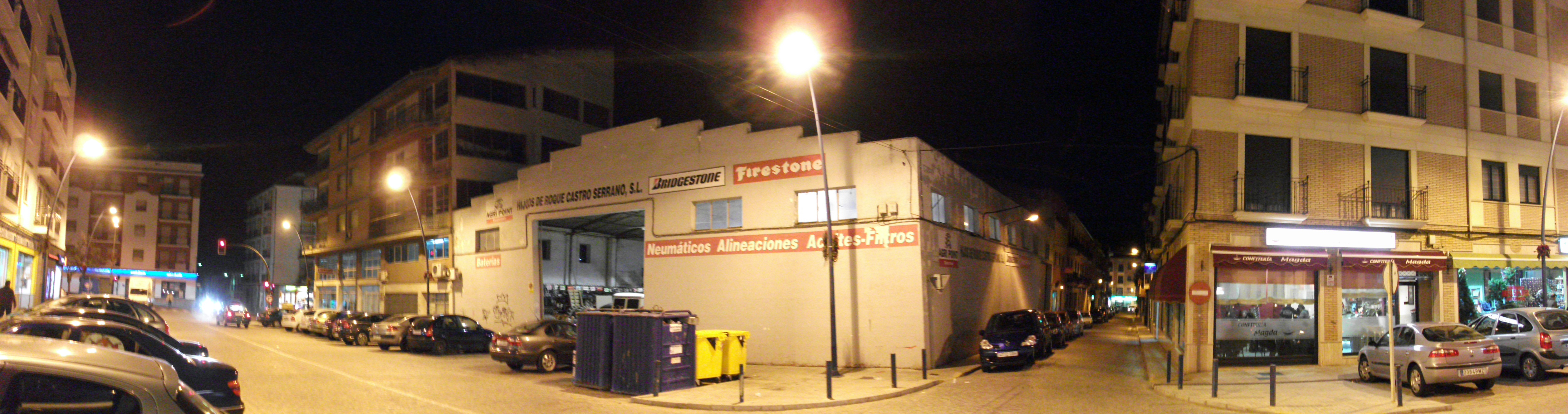 Imagen del Paseo de la Herradura. Dic. 2010